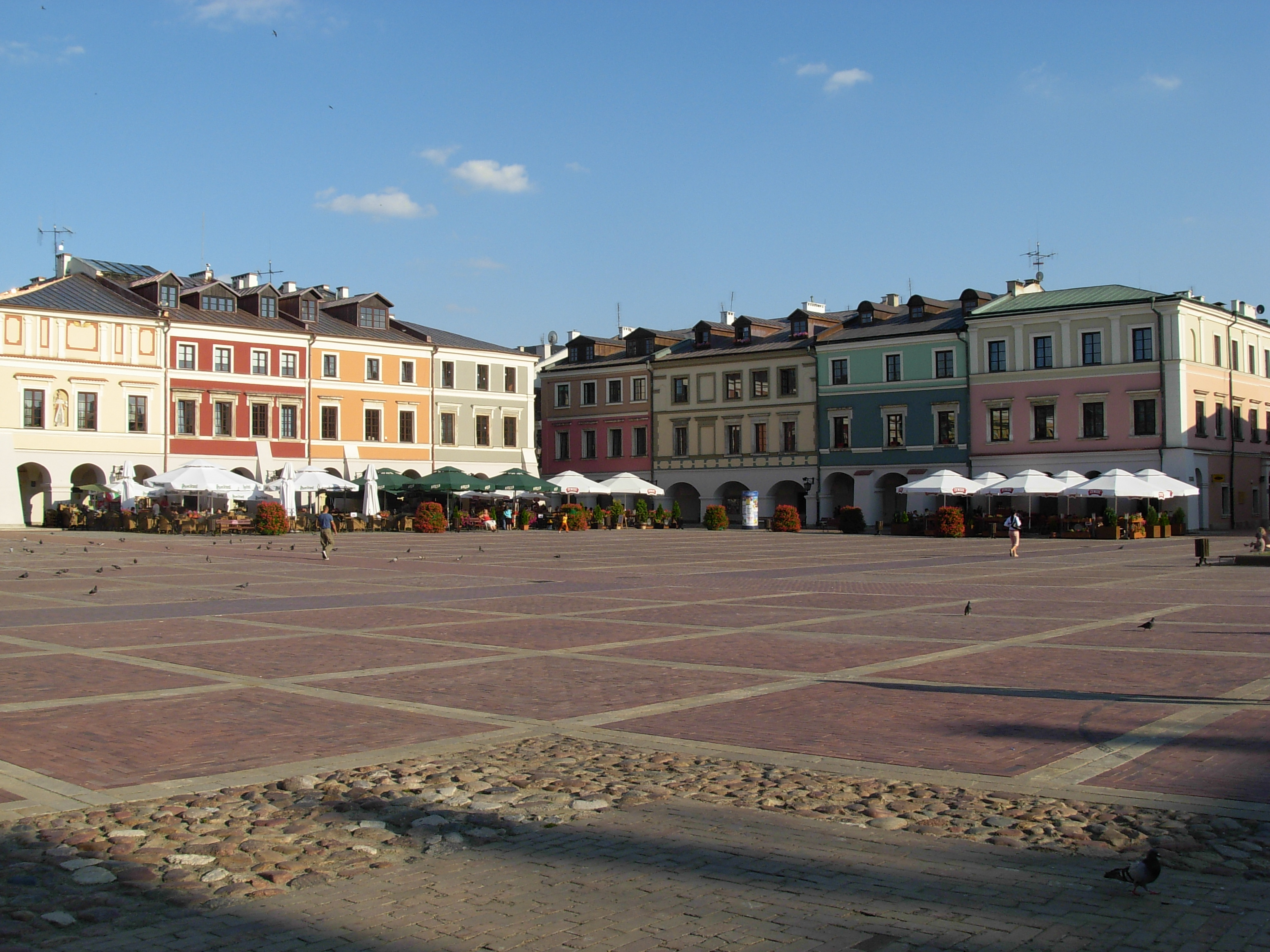 Zamość, Poland.